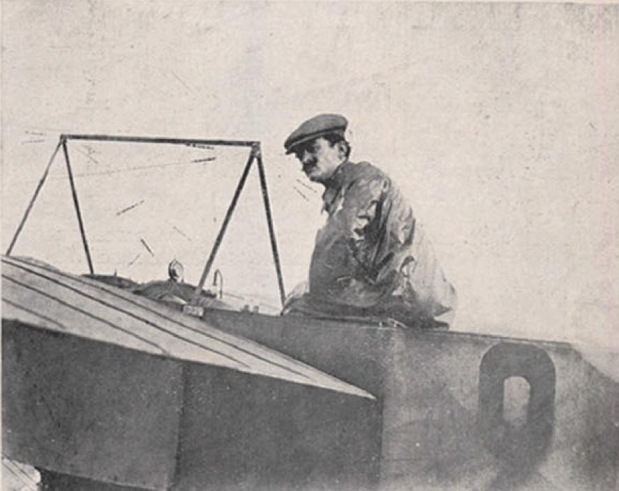 "Cattaneo pronto a volar". Bartolomeo Cattaneo realizó, en el mes de diciembre de 1910, el primer vuelo sobre la ciudad de Santiago de Chile.